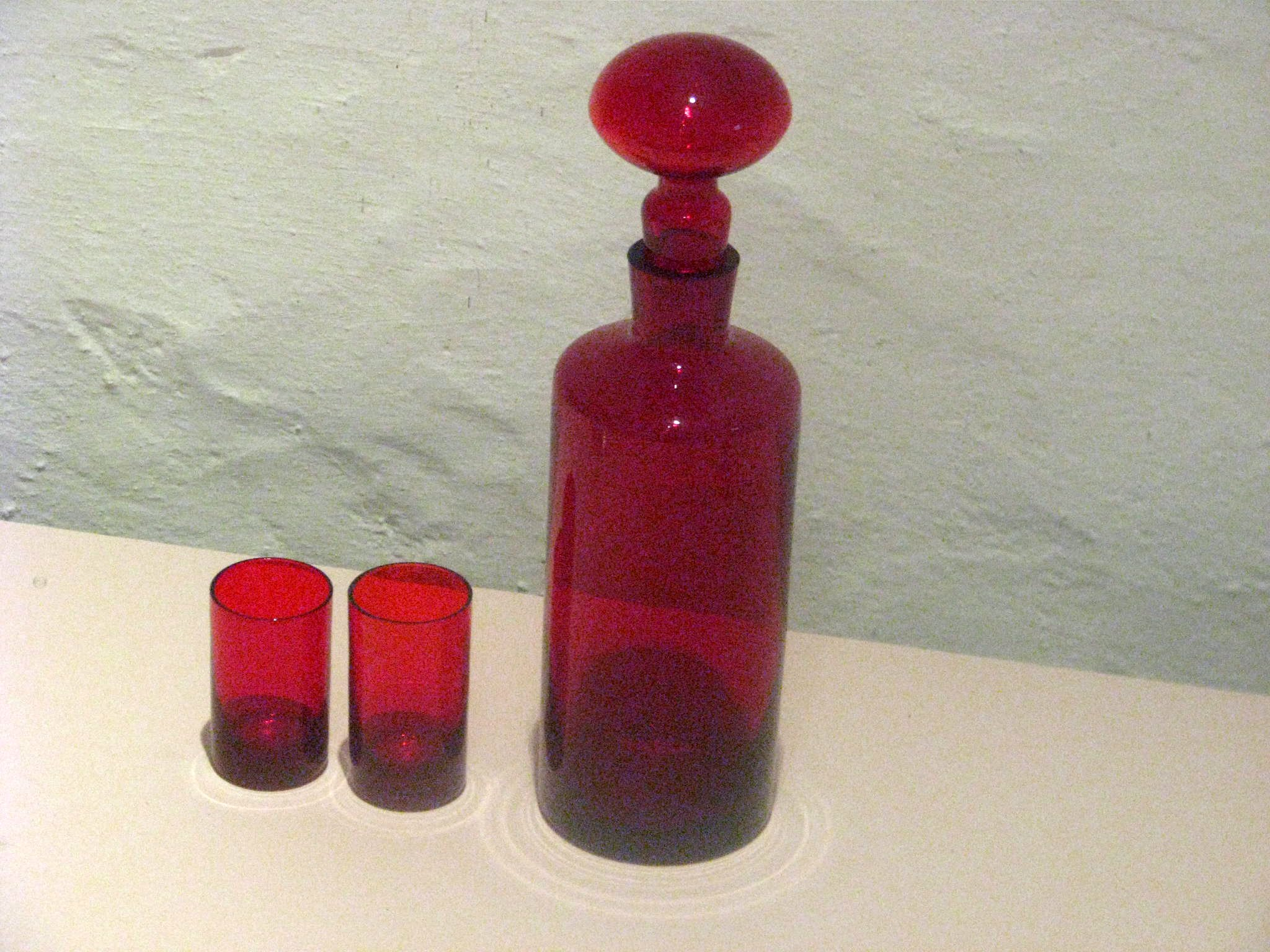 Steklarski izdelki iz Kozjanskega, Slovenija